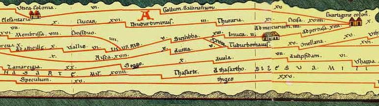 Deel van Tabula Peutingeriana met Utica en Carthago